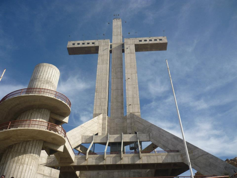 VISTA DESDE LA PRIMERA PLANTA